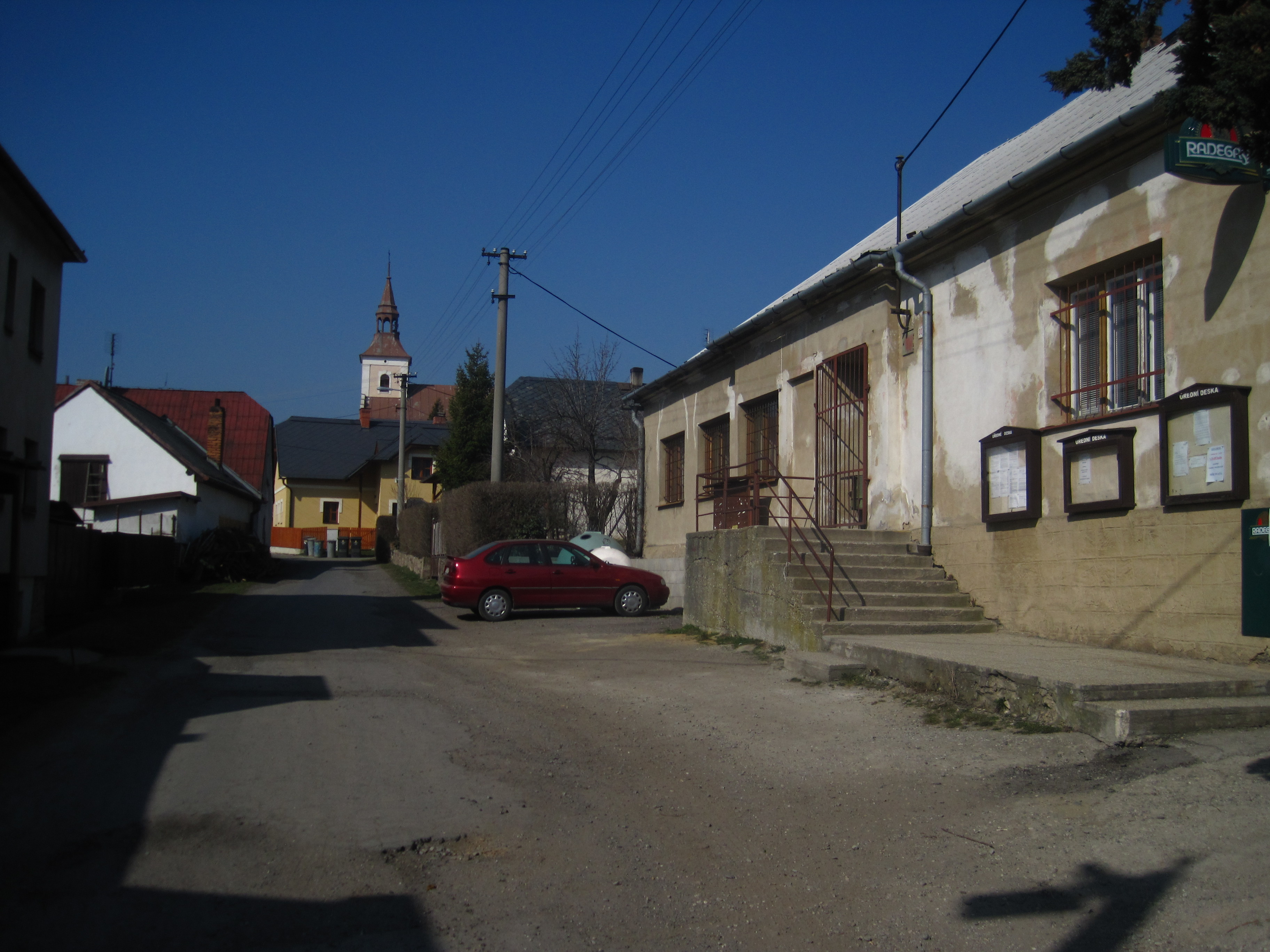 Bratříkovice u Opavy - průhled vsí směrem ke kostelu